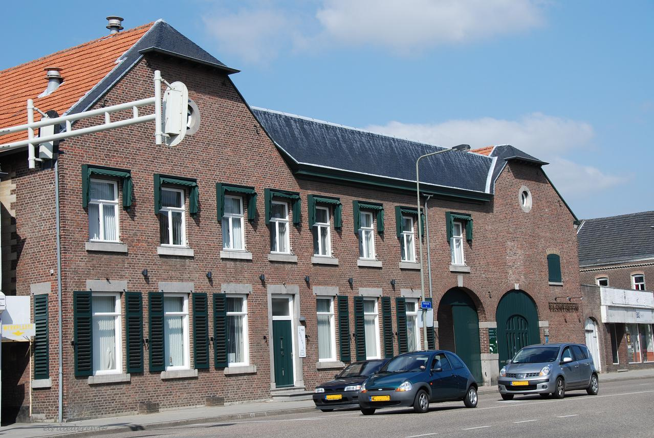 Limburgs: Baek 't Els museum